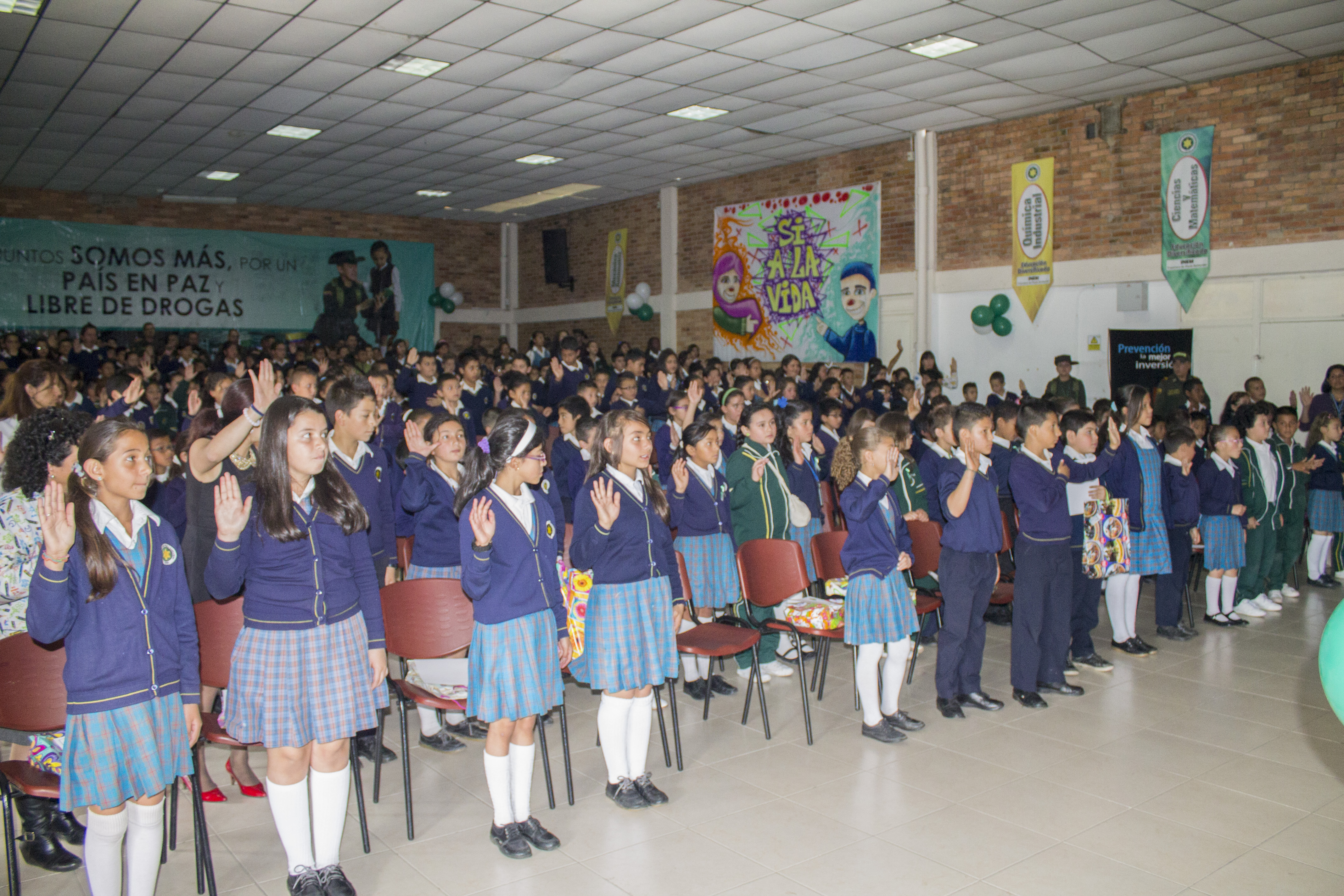 Graduación programa DARE